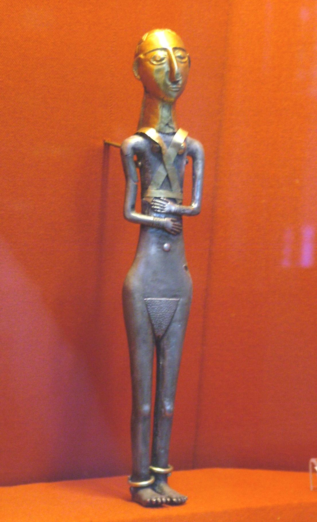 Istennőszobor az Anatóliai Civilizációk Múzeumában, Ankara